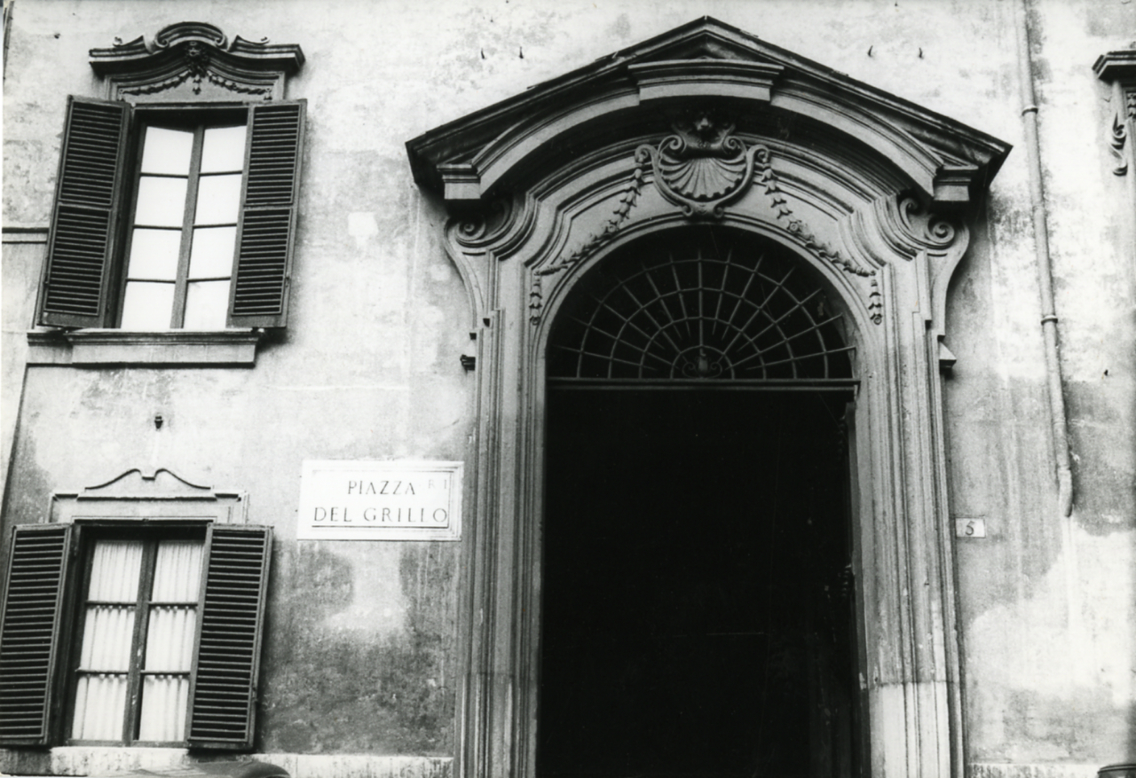 Servizio fotografico : Roma, 1969 / Paolo Monti. - Stampe: 11 : Positivo b/n, gelatina bromuro d'argento/ carta, 13x18. - ((Al verso delle stampe manoscritto numero progressivo:4, 7-8, 10, 12, 19, 23-25. Sul coperchio della scatola manoscritto: "Ritratti". - Occasione: Documentazione ambienti del Palazzo del Grillo per Galleria Dè Foscherari.